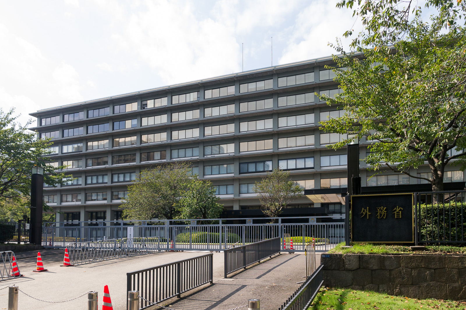 外務省、東京都千代田区霞が関。